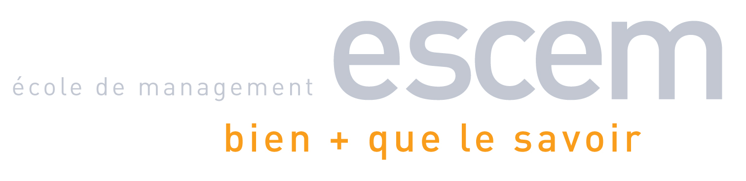 ESCEM : Ecole supérieure de commerce et de management